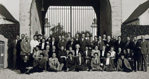 Reünie van de familie Regout op kasteel Meerssenhoven bij Maastricht omstreeks 1950. Het kasteel werd tot 1953 bewoond door Adhémar "Gustave" Frederik Edouard Regout (1919-1953), die in augustus van dat jaar bij een auto-ongeluk in Zweden om het leven kwam. Fotocollectie RHCL Maastricht, GAM 9123.